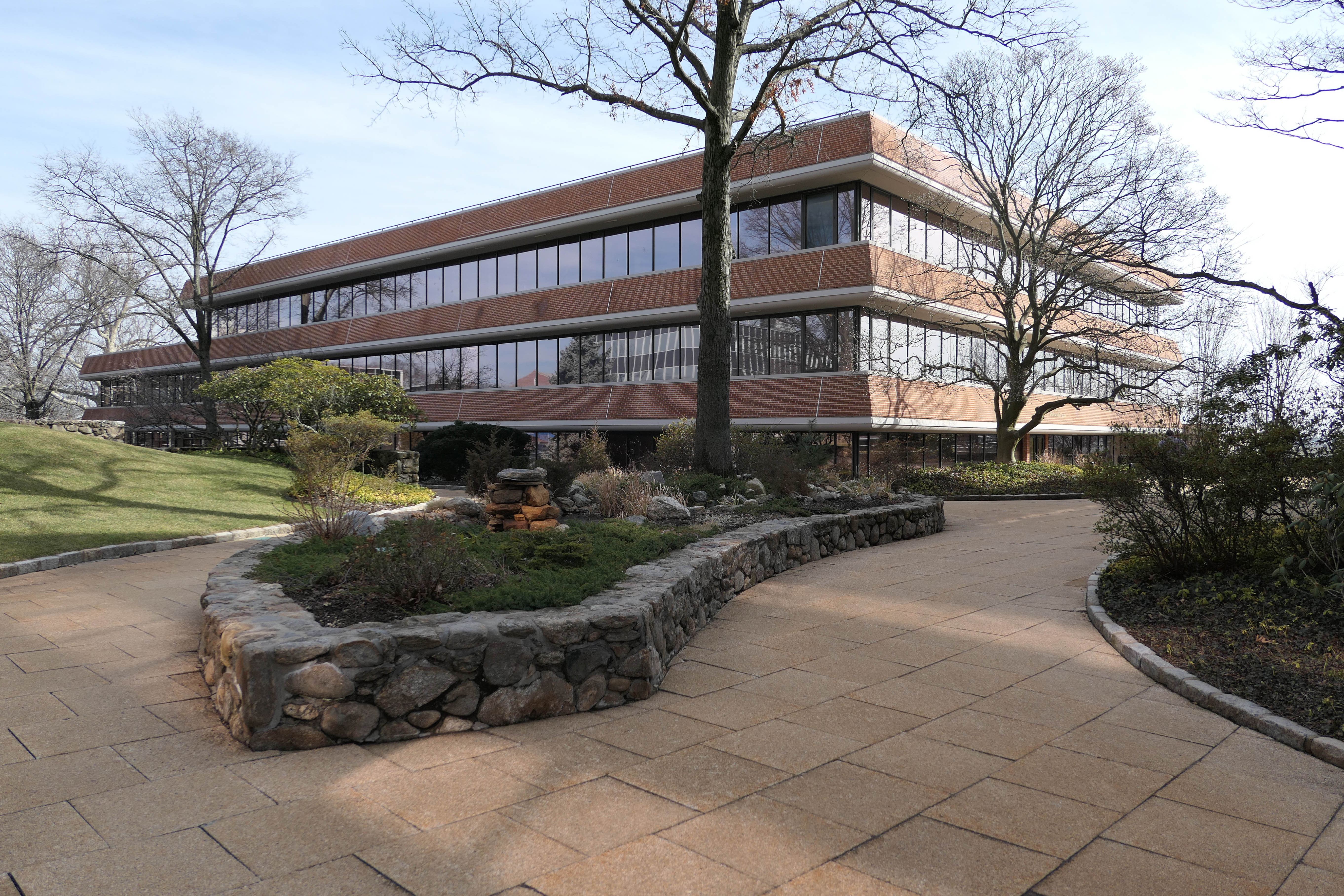 Pickwick Plaza